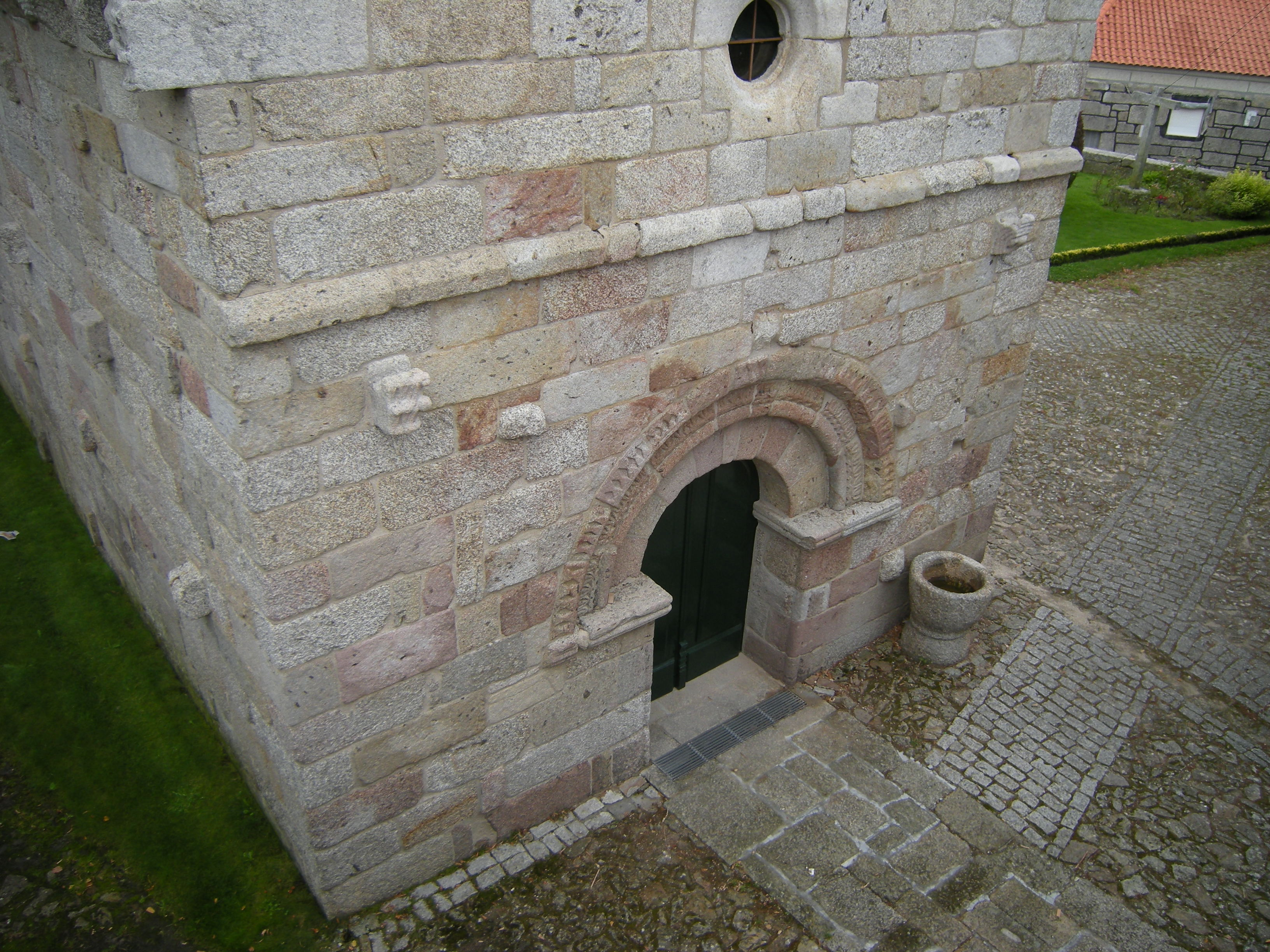 Igreja de São Vicente da Chã - Montalegre - Portugal